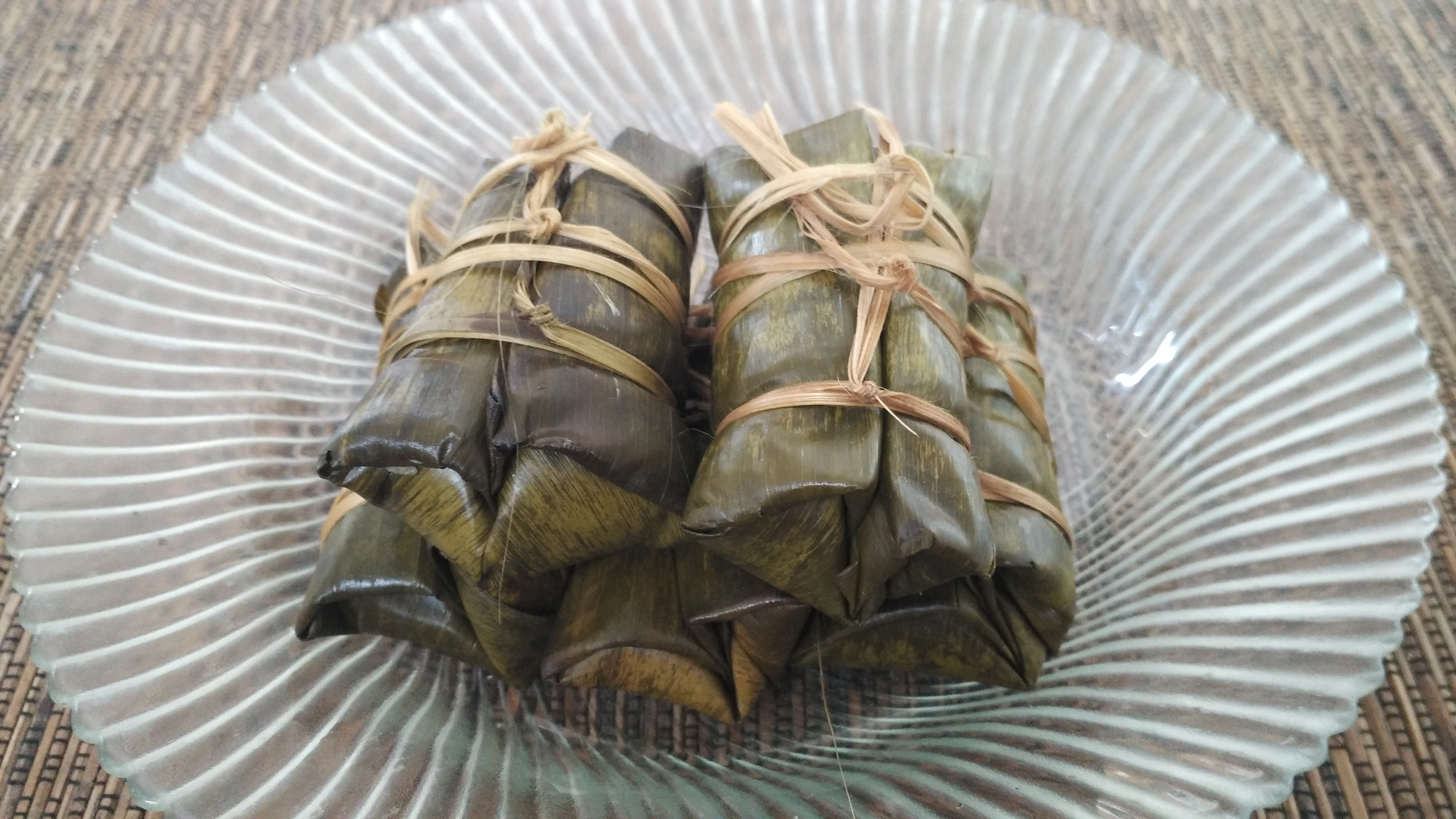 Legondho adalah kue tradisional khas Yogyakarta